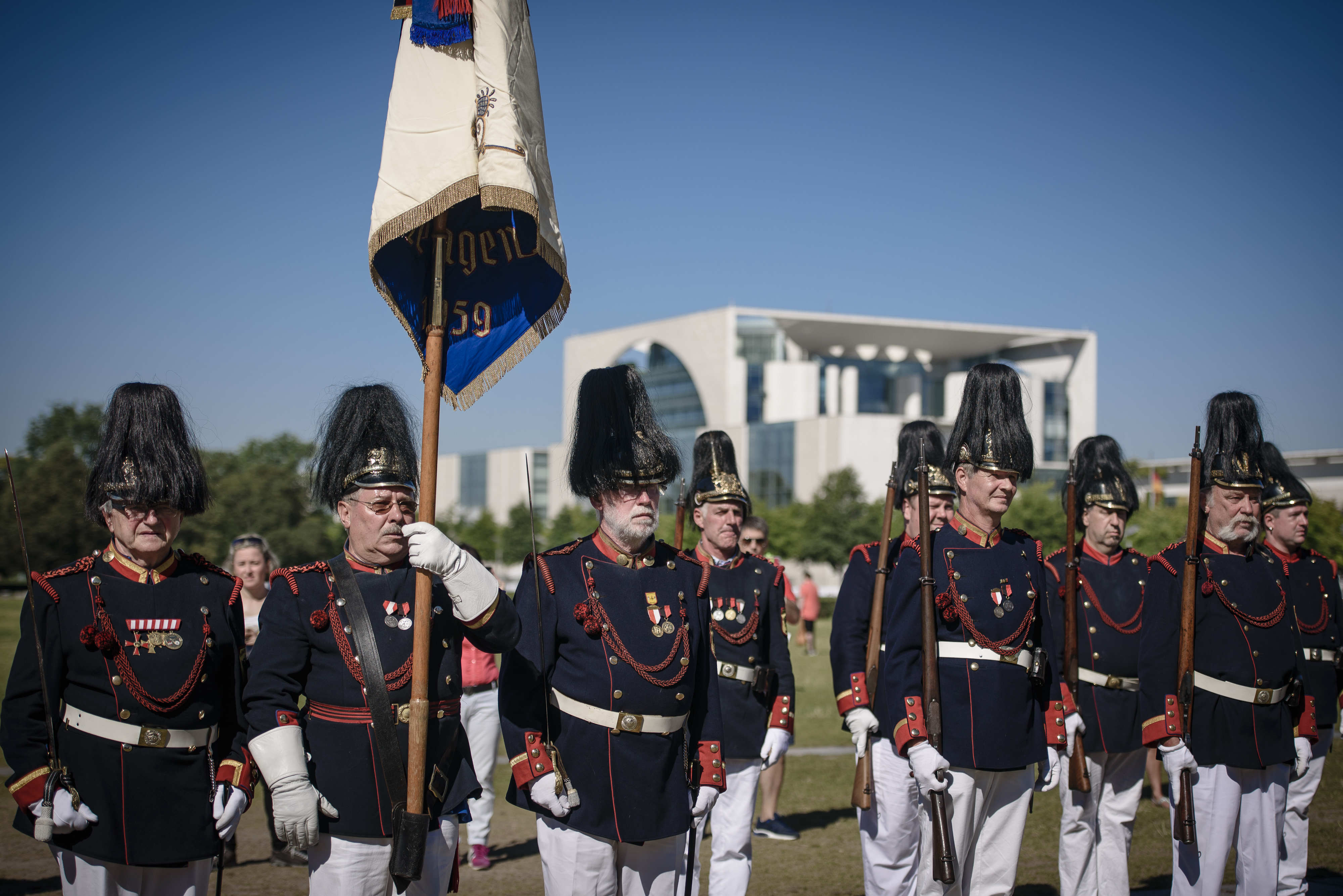 Bürgerwache Mengen am Freitag (26.08.16) am Kanzleramt in Berlin